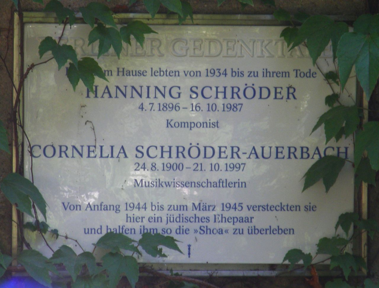 Berliner Gedenktafel für Hanning Schröder und Cornelia Schröder-Auerbach. Quermatenweg 148, Berlin-Zehlendorf, enthüllt am 23. Mai 2002